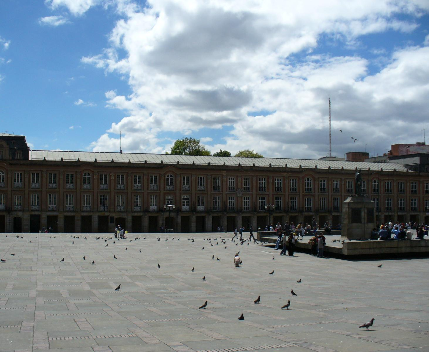 Sede de la Alcaldía de Bogotá, Colombia